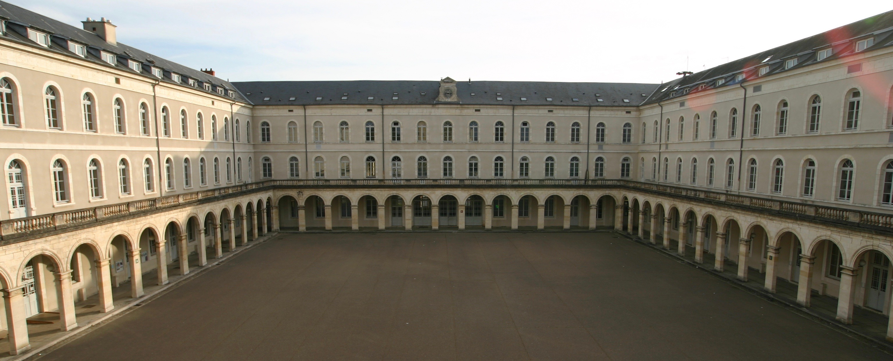 Vue d'ensemble de la cour intérieure du lycée Jacques Cœur. Bourges, France.